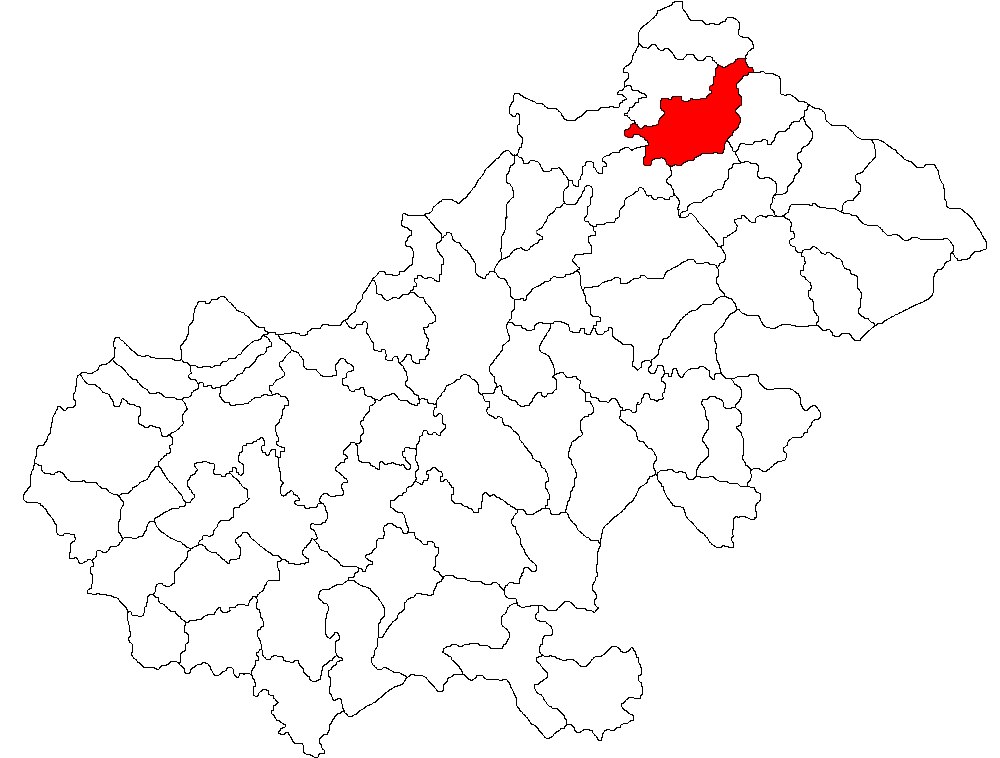 Categorie:Hărţi ale judeţului Satu Mare